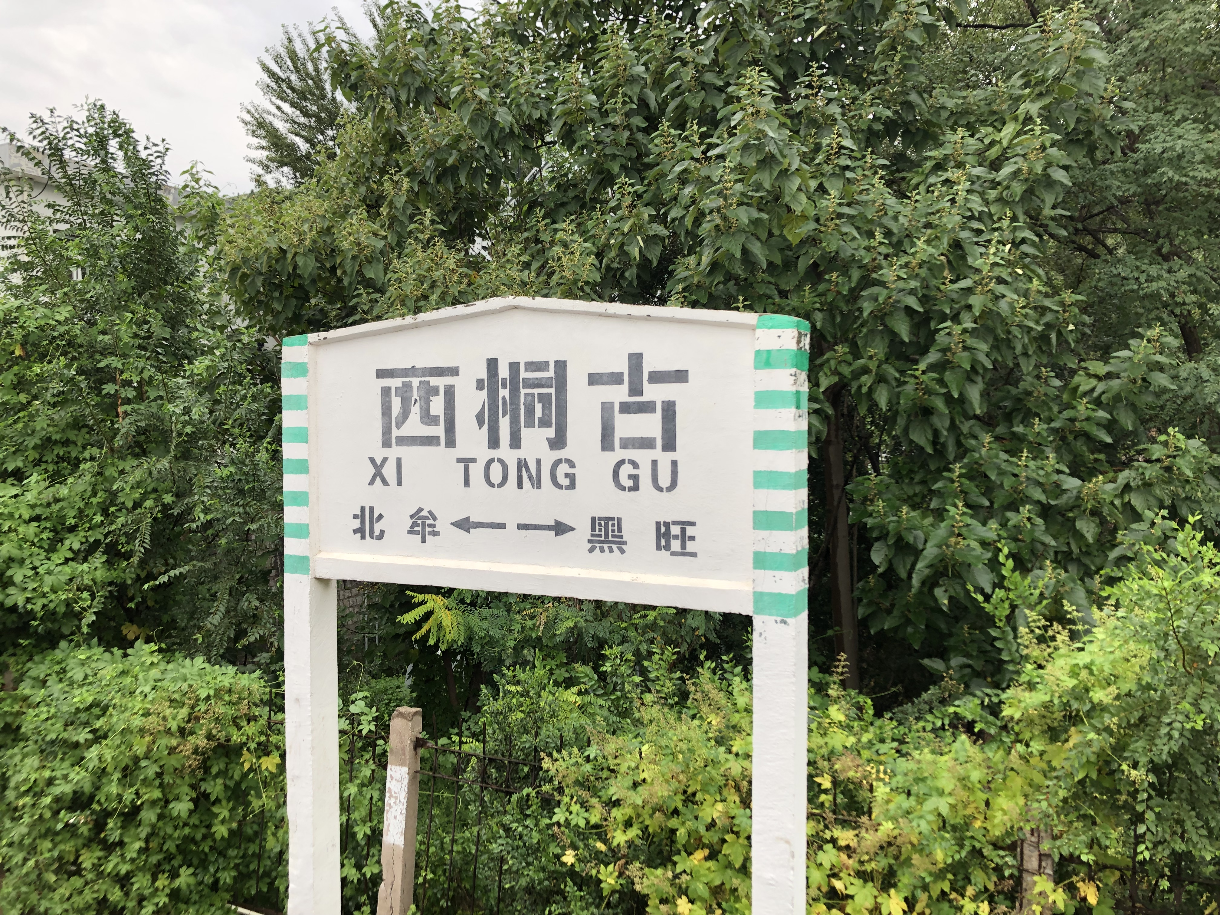 中文（中国大陆）: 西桐古站的站牌。